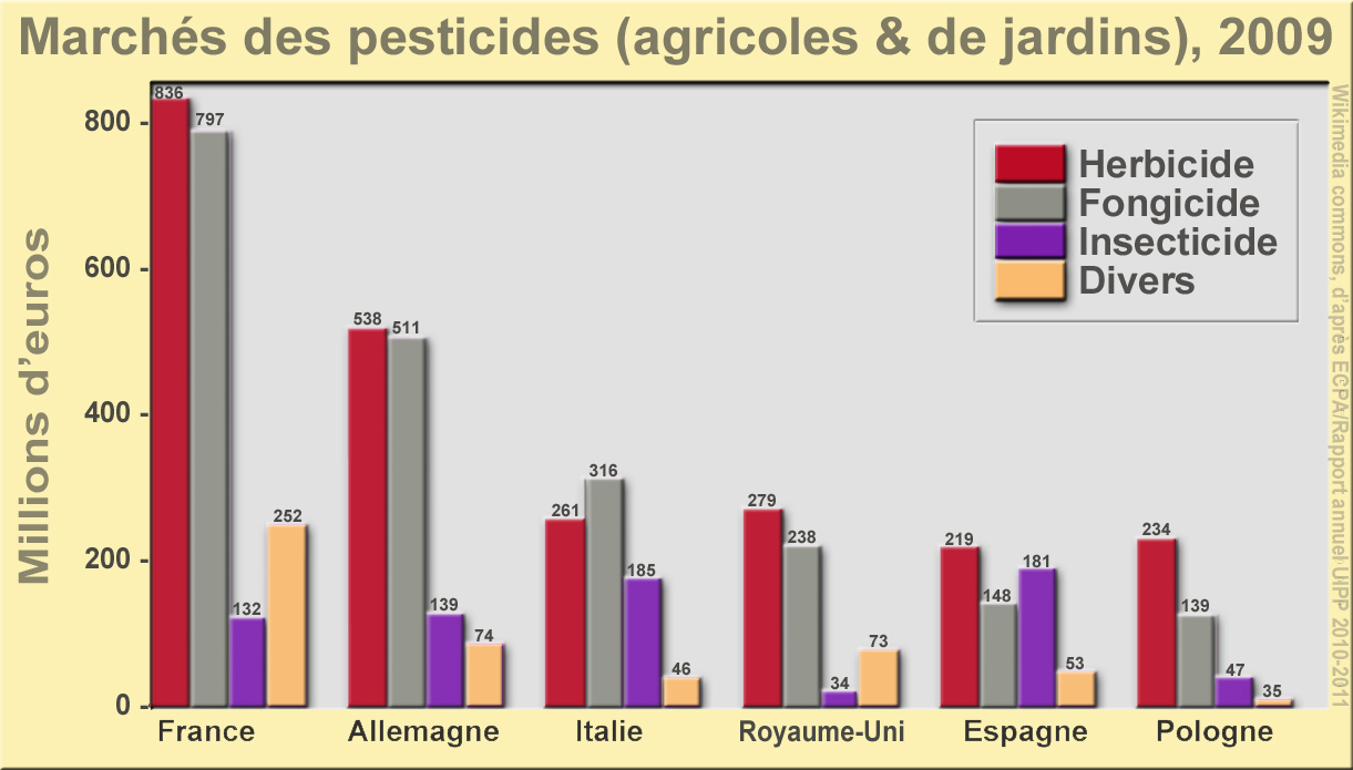 Graphique représentant pour 6 pays européens, les valeurs monétaires (en millions d’euros) des marchés phytosanitaires, pour 4 types de pesticides (Insecticide, fongicide, désherbant, divers) pour 2009, selon l'UIPP, citant l'ECPA (association européenne des firmes phytosanitaires, pour "European Crop Protection Association") comme source